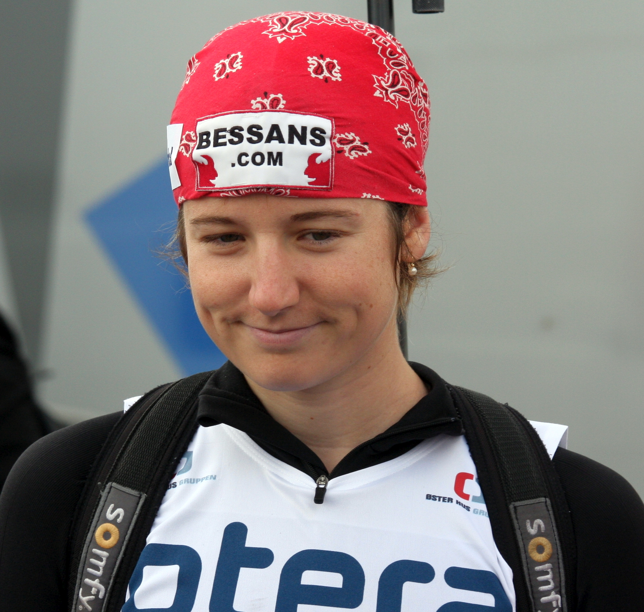 Pauline Macabies under Blinkfestivalen i Sandnes 2009